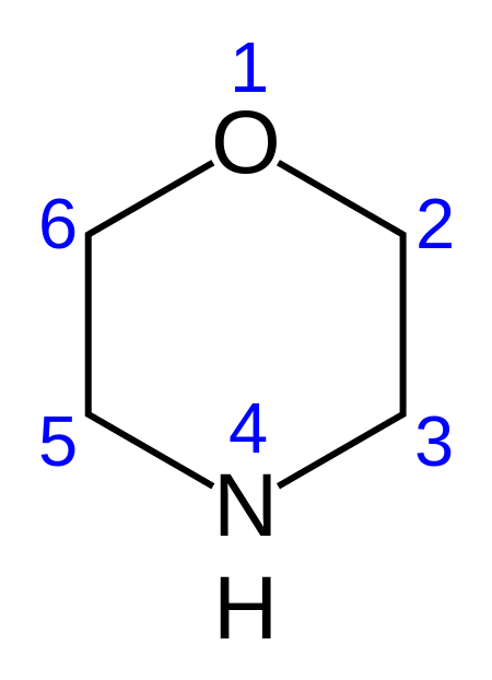 morfolin